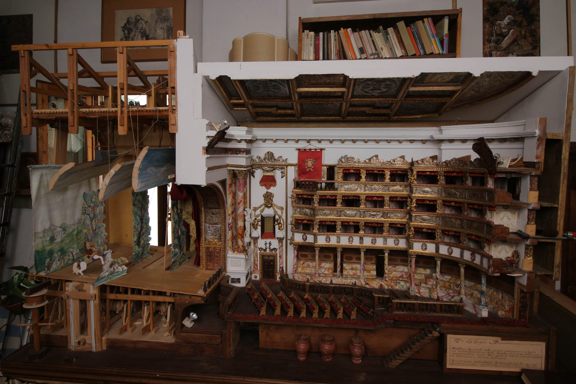 Modellino-Teatro-della-Pergola-ANNO1651.jpg